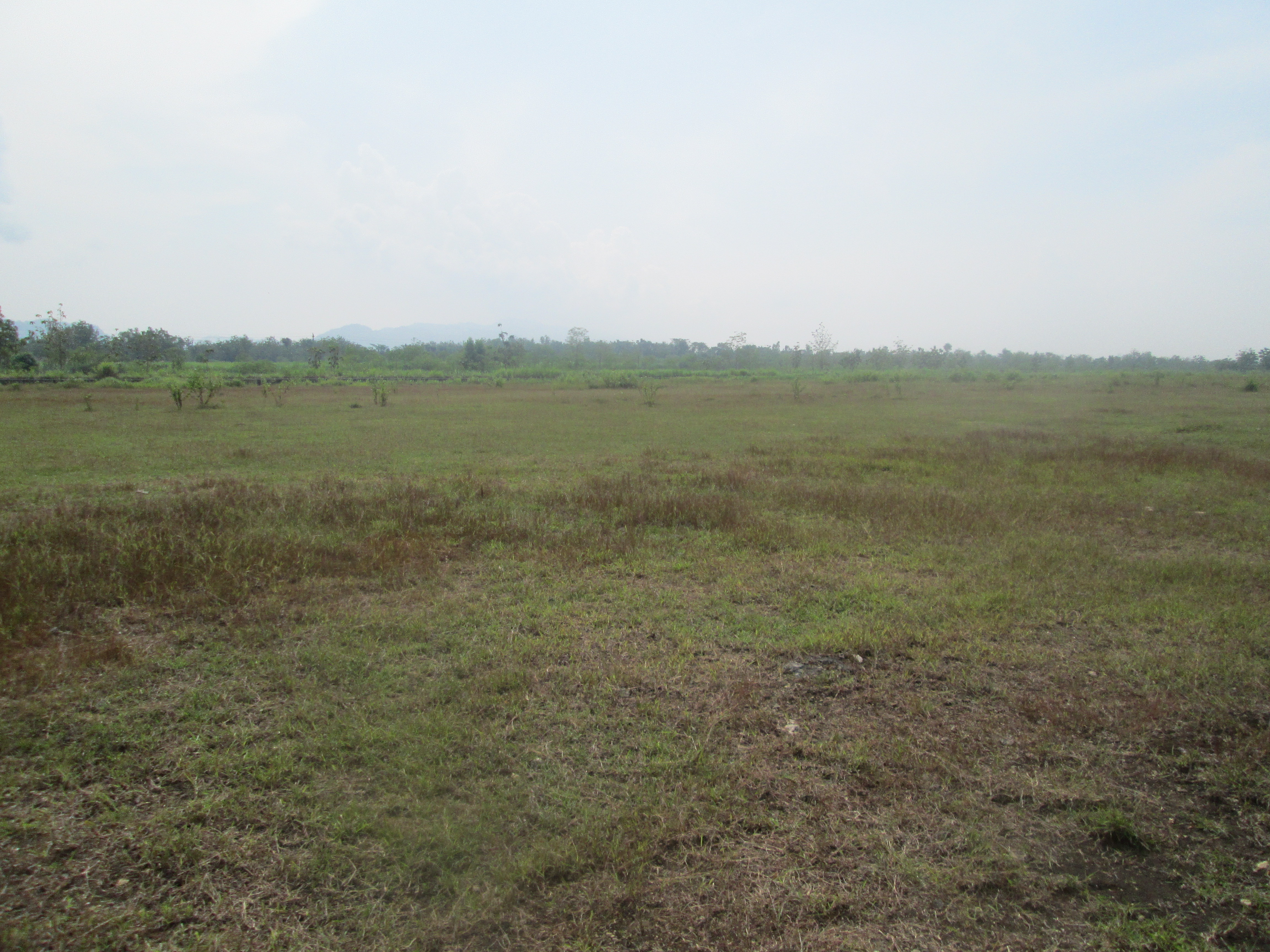 Bagian Lapangan Udara Gading di Desa Gading, Kecamatan Playen, Kabupaten Gunungkidul, Daerah Istimewa Yogyakarta. Foto diambil di bagian lanud di dekat jalan raya Wonosari-Yogyakarta.